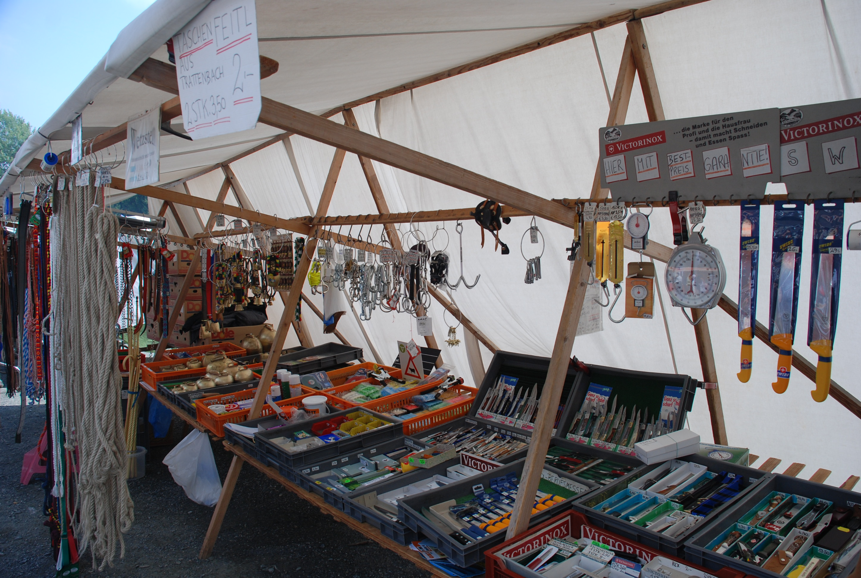 Hebalmkirtag Almbedarf